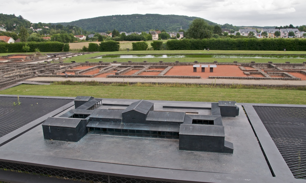 Reschter vun der Réimervilla zu Iechternach mat Maquette Kategorie:Gemeng Iechternach Iechternach Kategorie:Kuckeswäertes am Kanton Iechternach